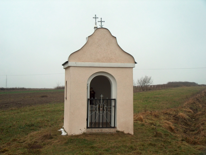 zdjęcie kapliczki we wsi Biała